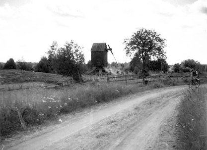 Marum väderkvarn, Norr-Marum Björkö-Arholma Uppland